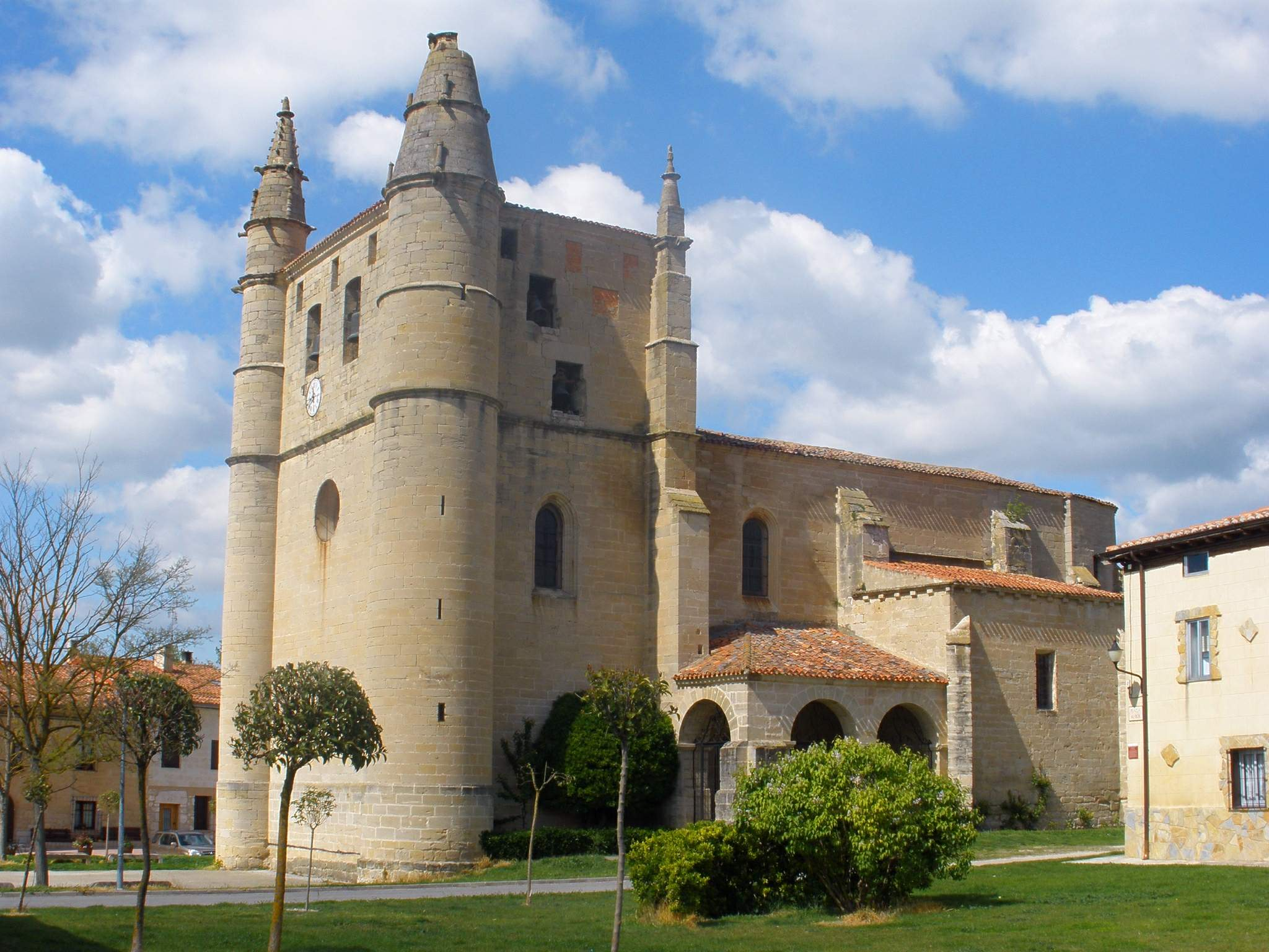 Orón (Miranda de Ebro) - Iglesia de San Esteban